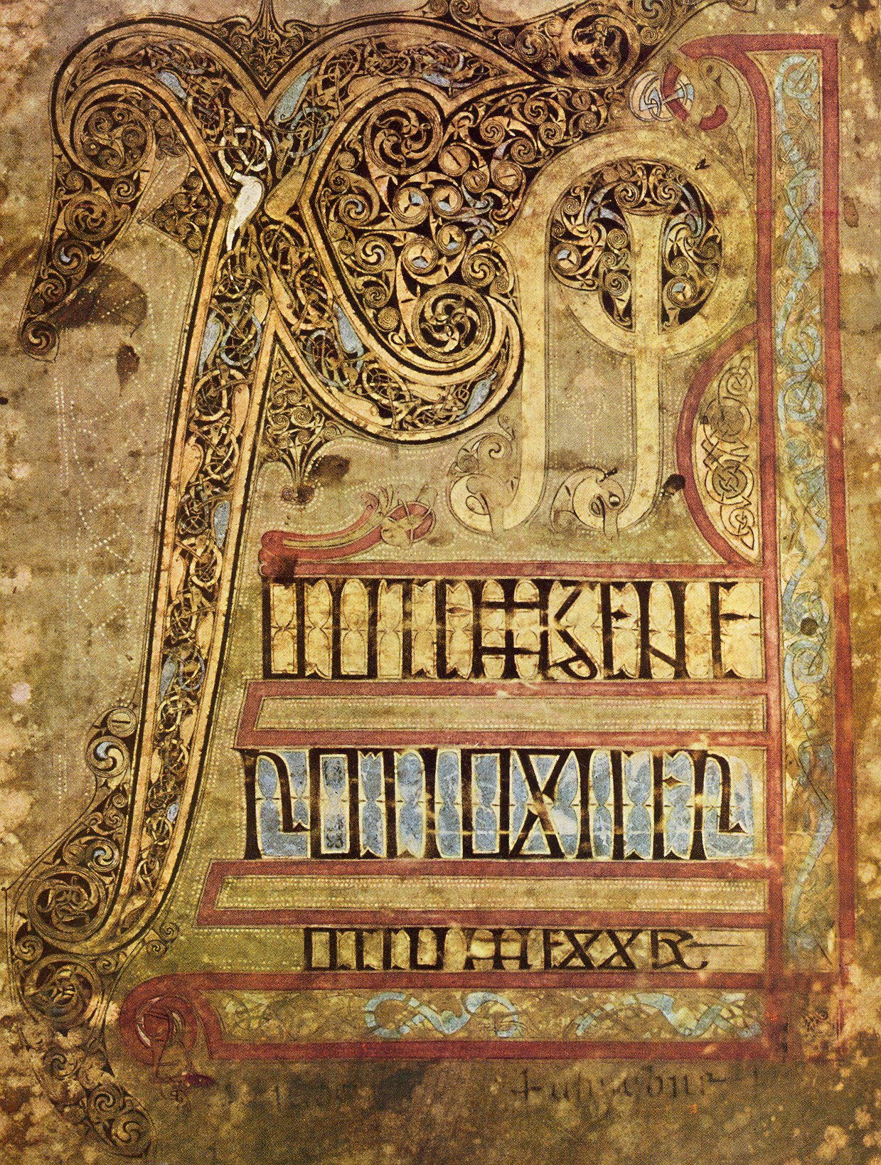 Art irlandais. Livre de Lichfield, fin du VIIIe siècle. Monogramme du Christ (Chi Rho).